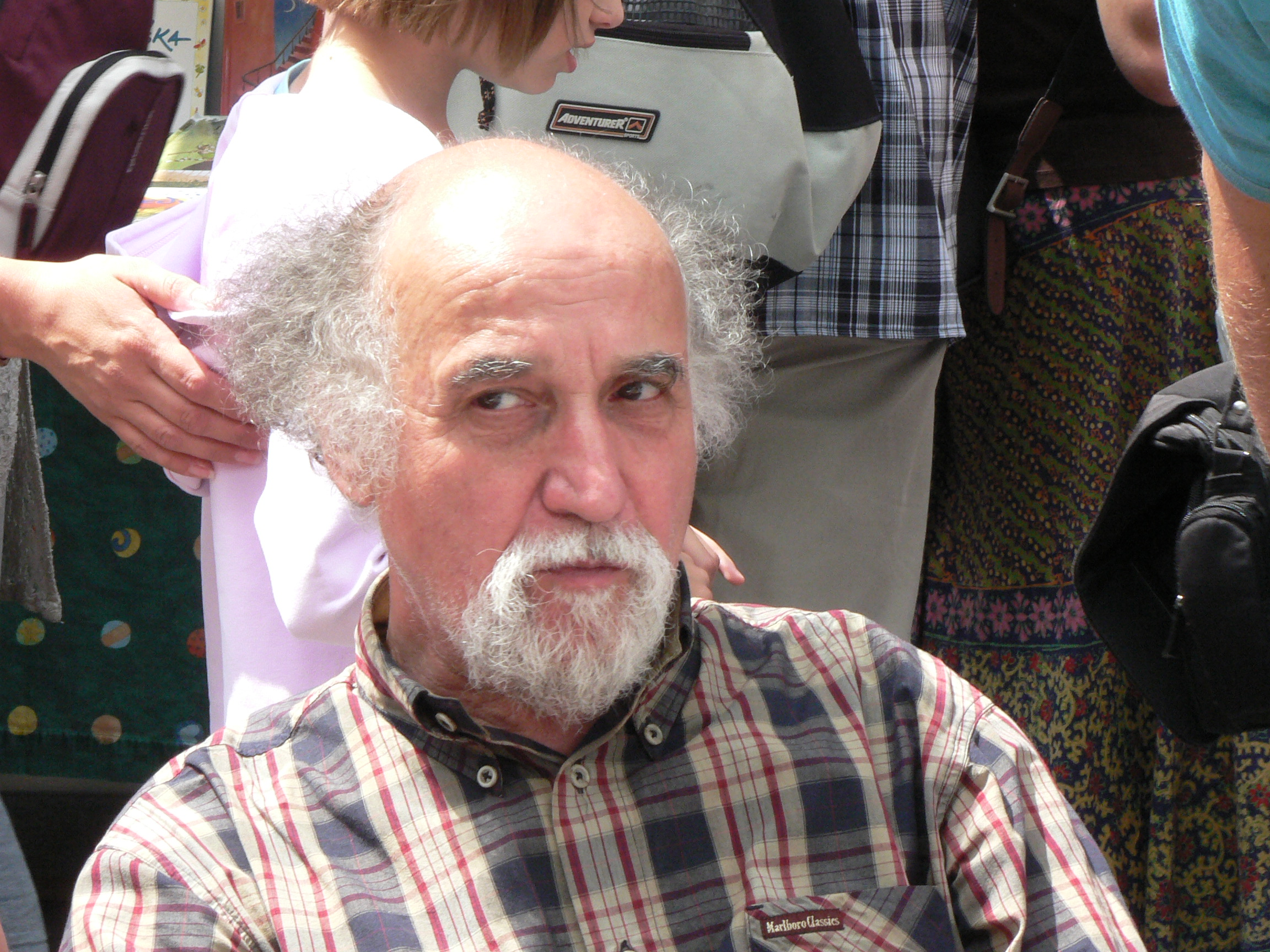 Sándor György humoralista dedikál a 78. Ünnepi Könyvhéten 2007. június 3 -án. A fénykép megjelent Creative Commons alatt a Metapolisz DVD sorozatban.